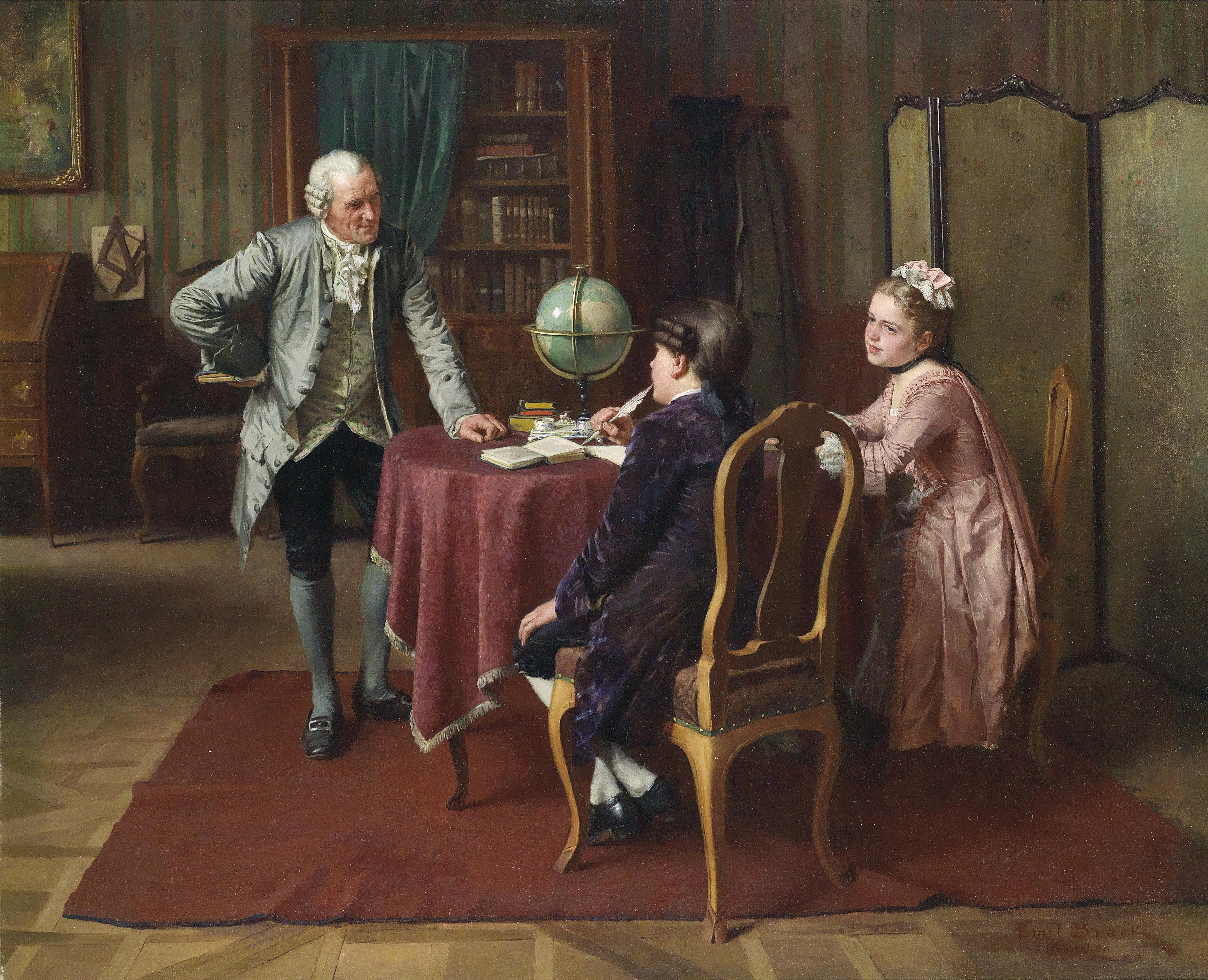 Die Geografiestunde, signiert, bezeichnet "Emil Brack München", Öl auf Leinwand, 63 x 77 cm